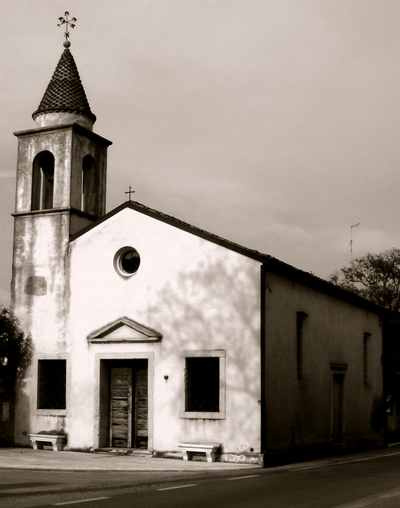 Foto di Paolo Steffan